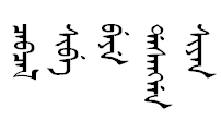 Officellt namn på Cabcal i Xinjiang.